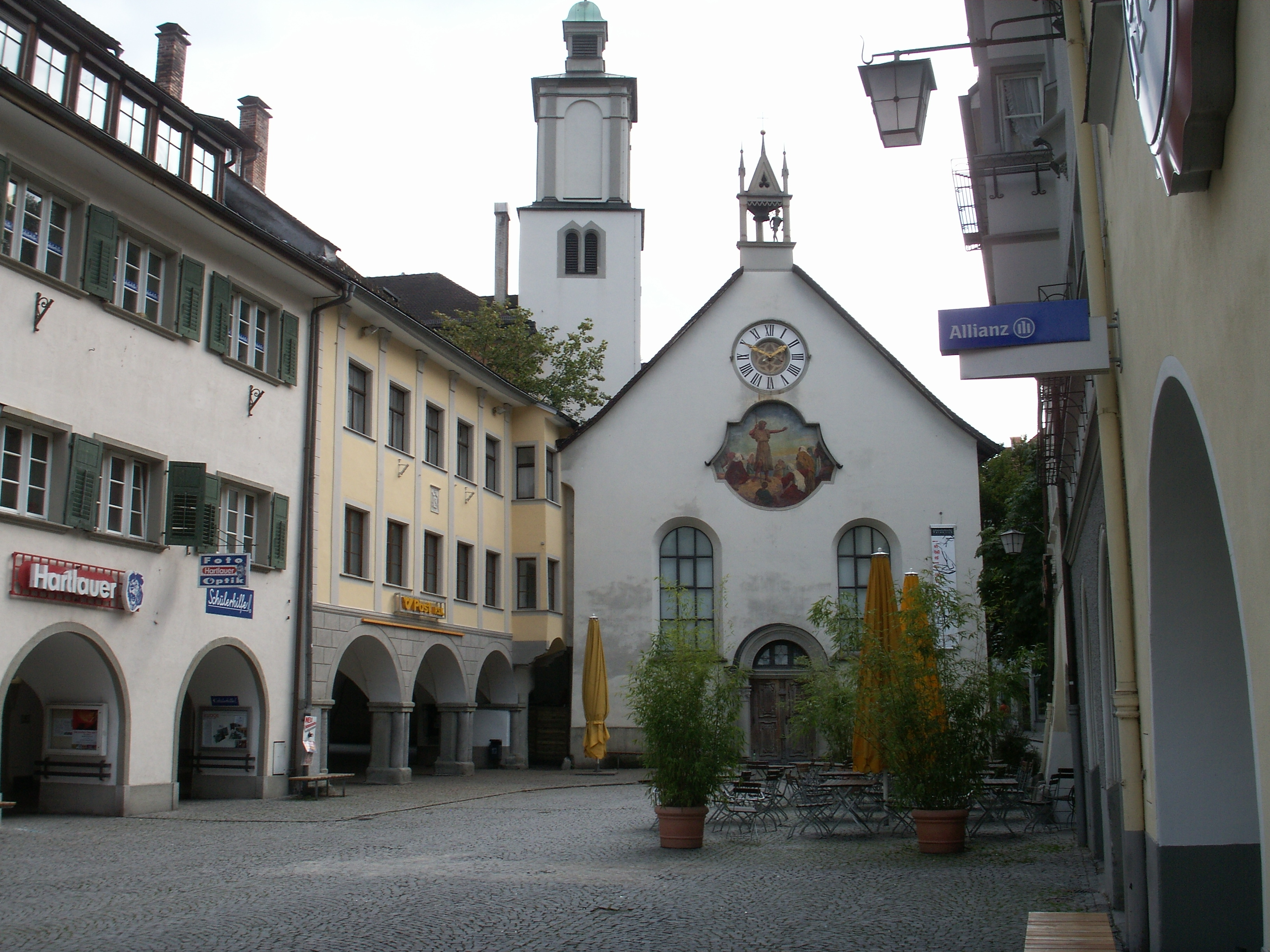 Feldkirch, Marktplatz, Johanniterkirche